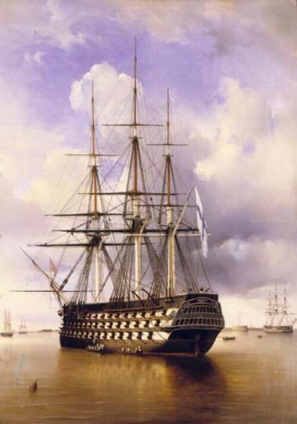 Russian 110-gun ship Imperator Aleksandr (1827).